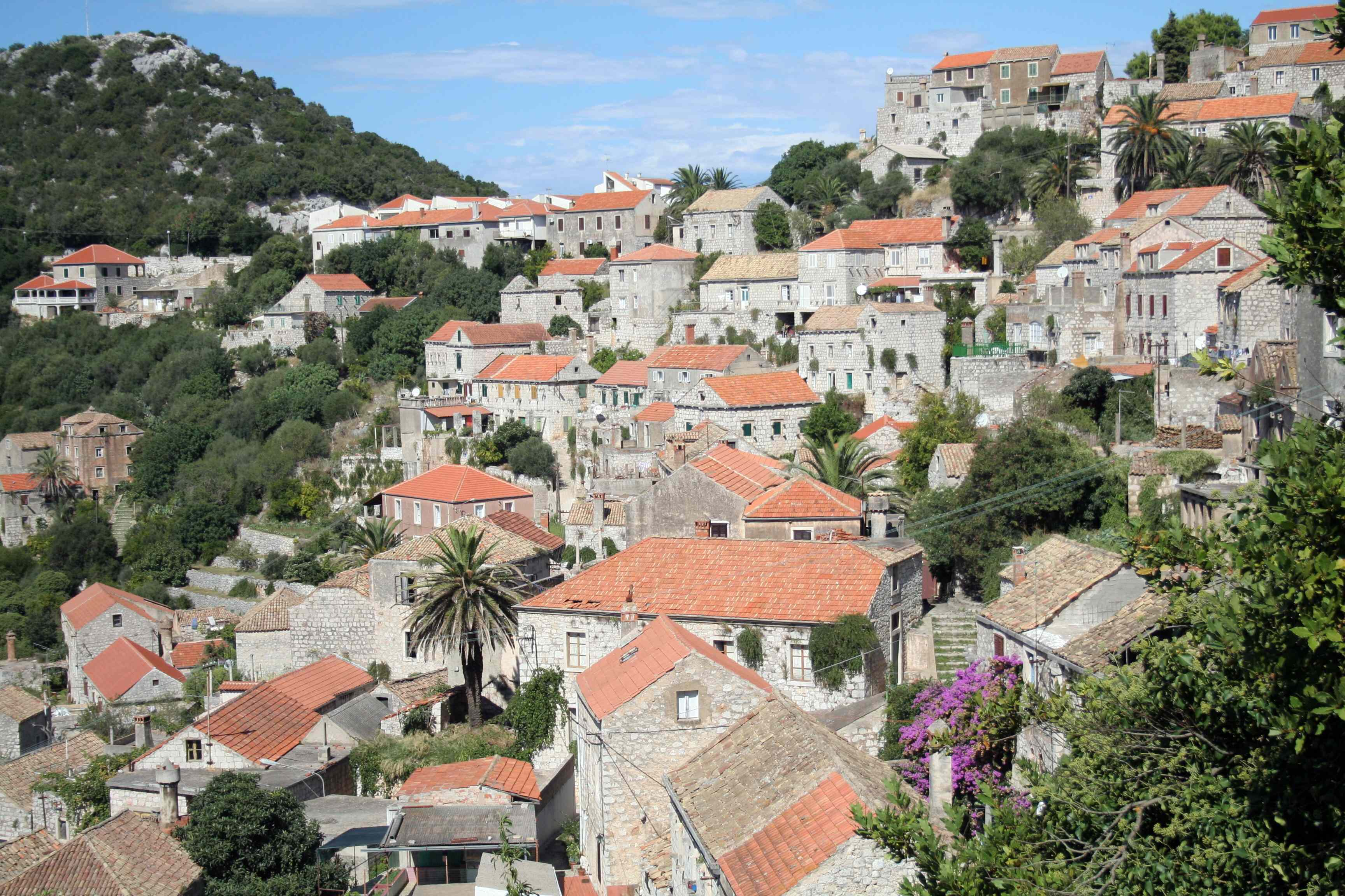 Lastovo, Ort